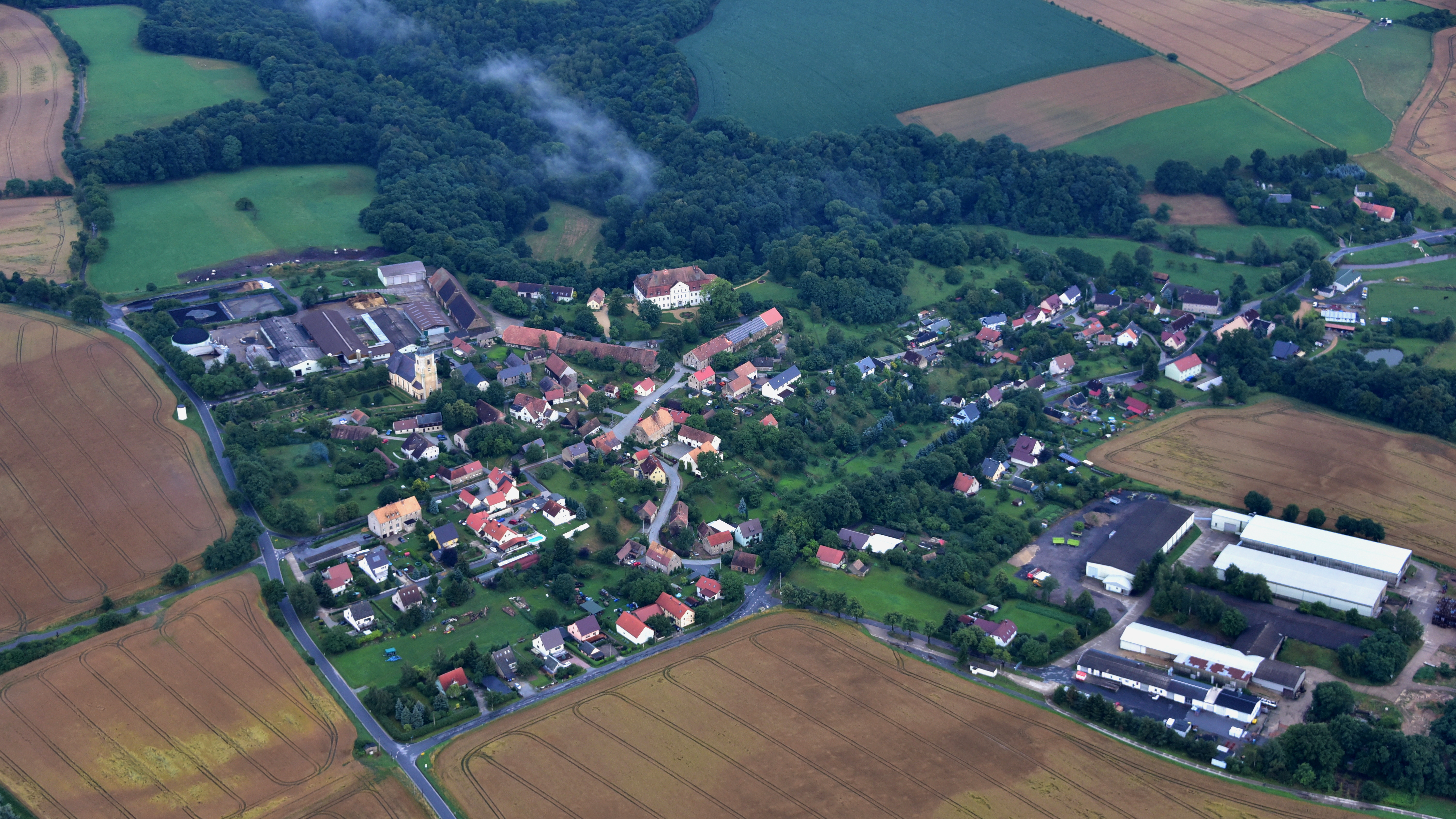 Gröditz (Weißenberg), Luftaufnahme (2017) Hornjoserbsce: Powětrowy wobraz Hrodźišća pola Wósporka (2017)